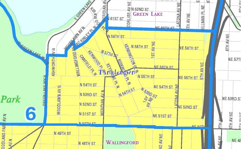 Surbaze de urba stratmapo, tiu ĉi mapo montras la limojn de "Meridian" aŭ "Tangletown", se oni distingas ĝin disde Wallingford kaj Green Lake; plejofte oni rigardas ĝin kiel parton de Wallingford